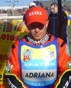 Wiesław Jaguś, polski żużlowiec (polish speedway rider)